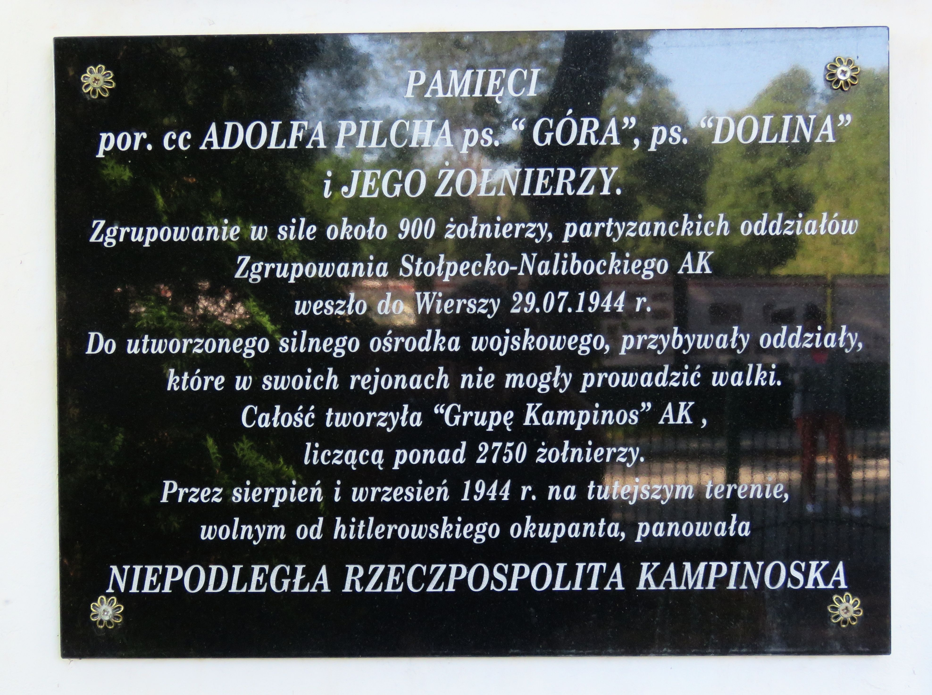 Kościół p.w. Św. Maksymiliana Marii Kolbe TABLICA NA KOŚCIELE 01